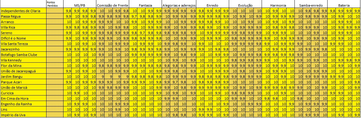 Resultados do Carnaval do Rio em 2020 - Grupo Especial da Intendente